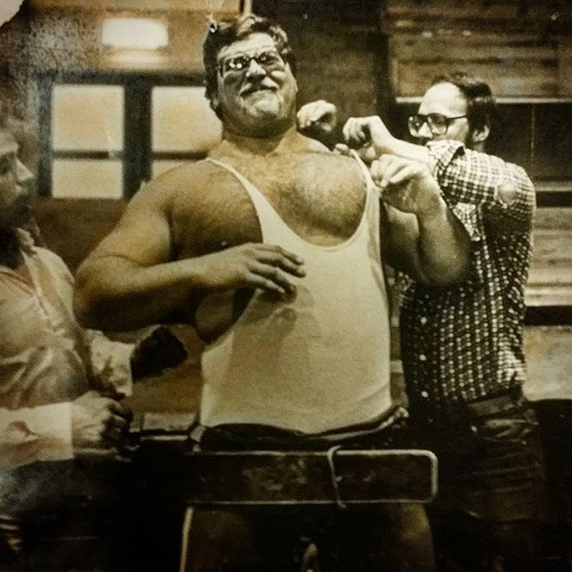 Lars Hedlund Bli iklädd Böj dräckt